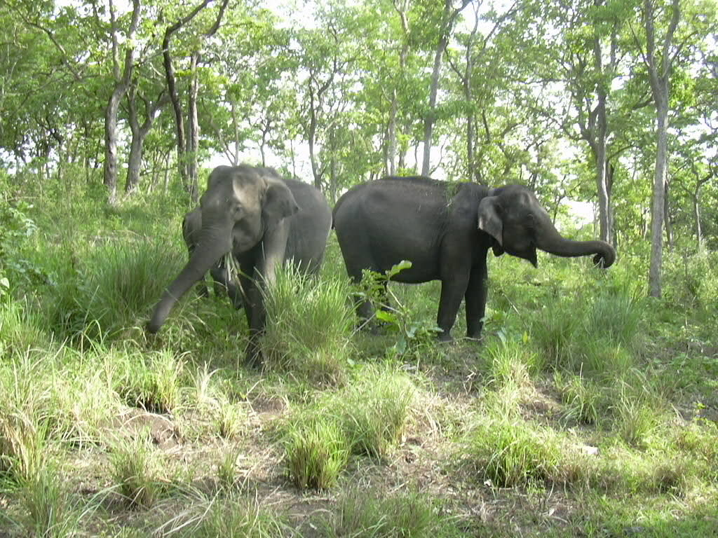 elephants,masanagudi,tamilnadu